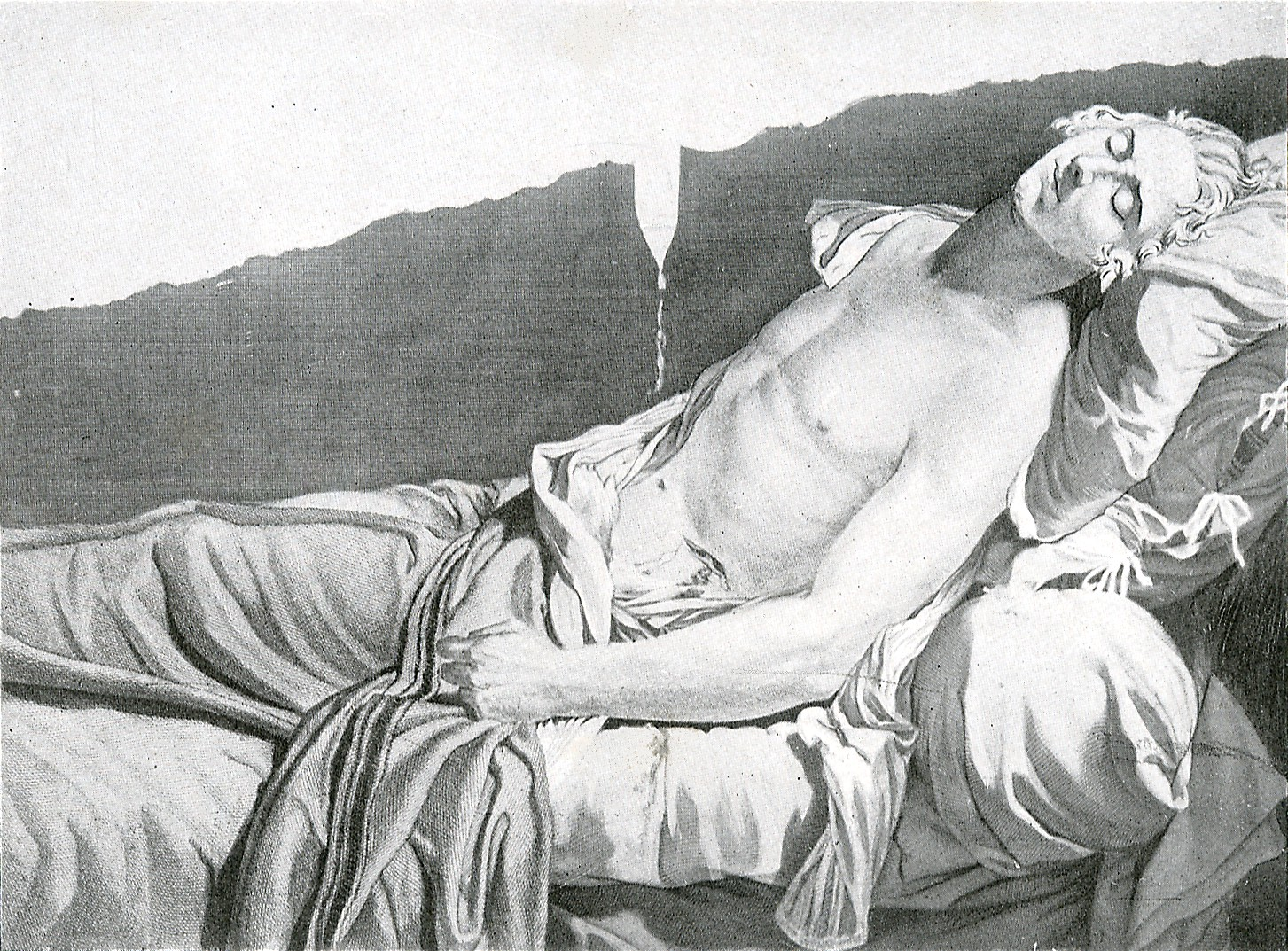 Les derniers moments de Michel Lepeletier Gravure d'Anatole Desvoge d'aprés Jacques Louis David